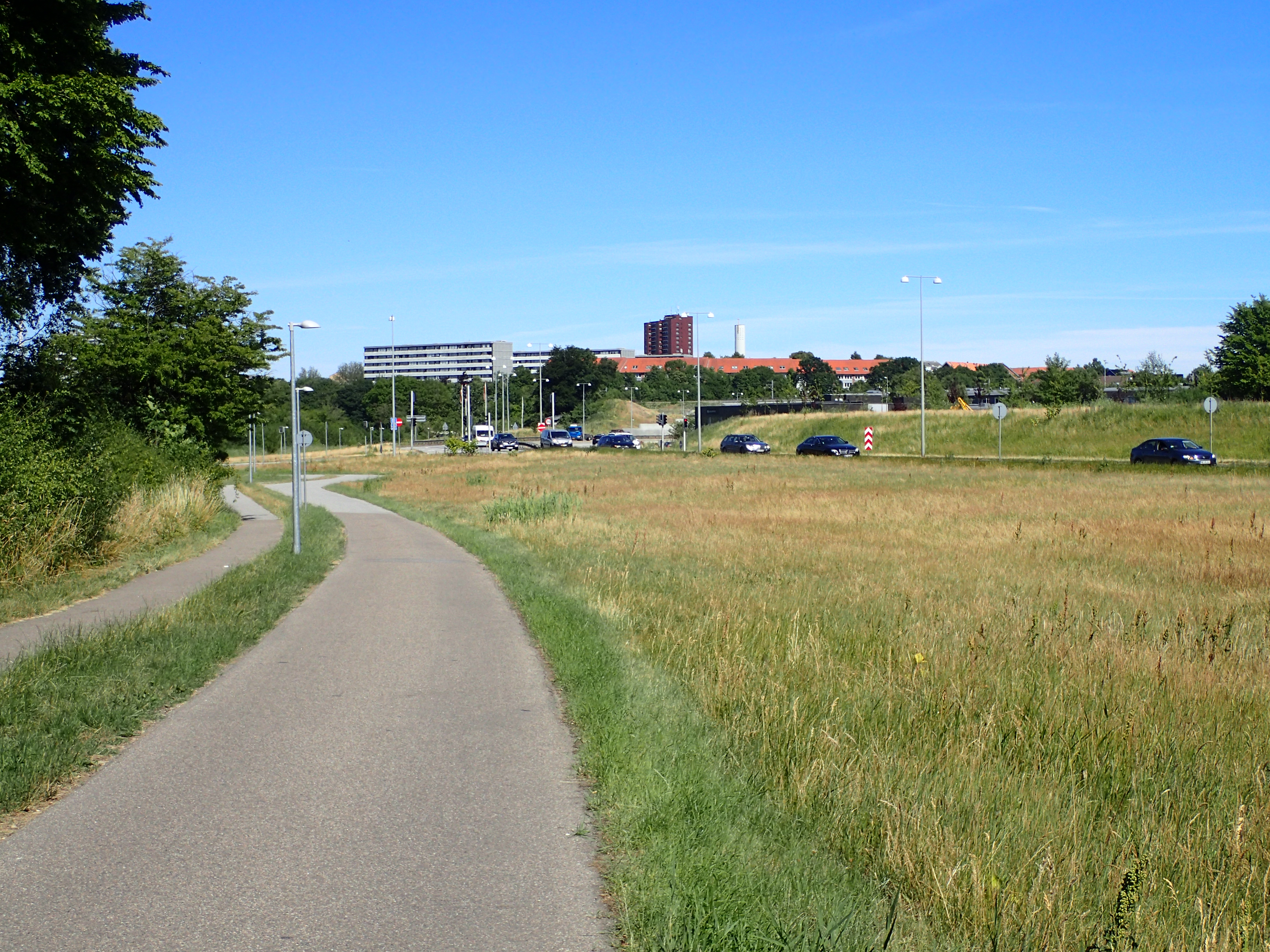 Brabrandstien ved Eskelund med udsigt til Åhavevej og Langenæs.